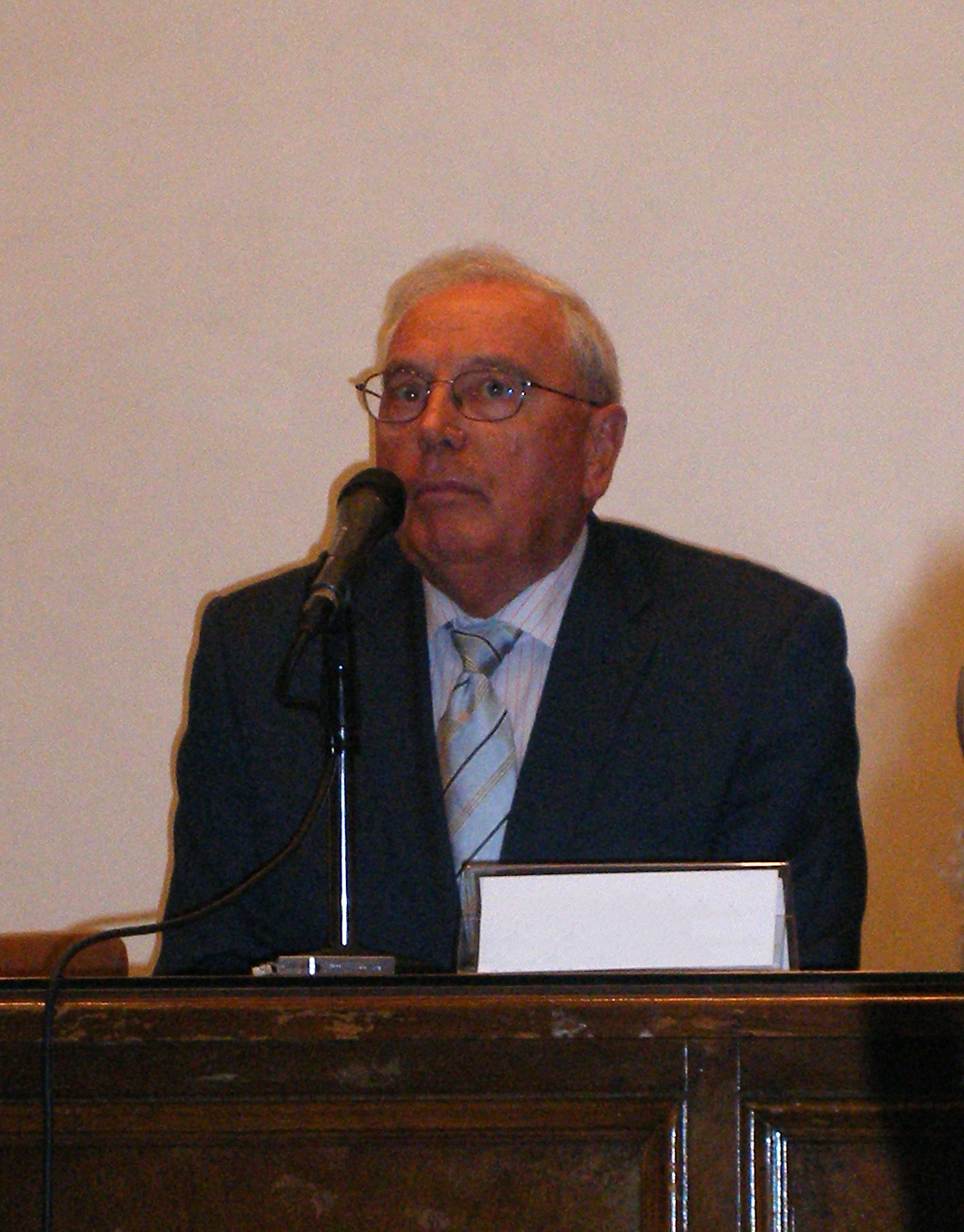 Aragonés: Juan José Guillén, en a presentazión de l'Academia de l'Aragonés en a Unibersidat de Zaragoza.